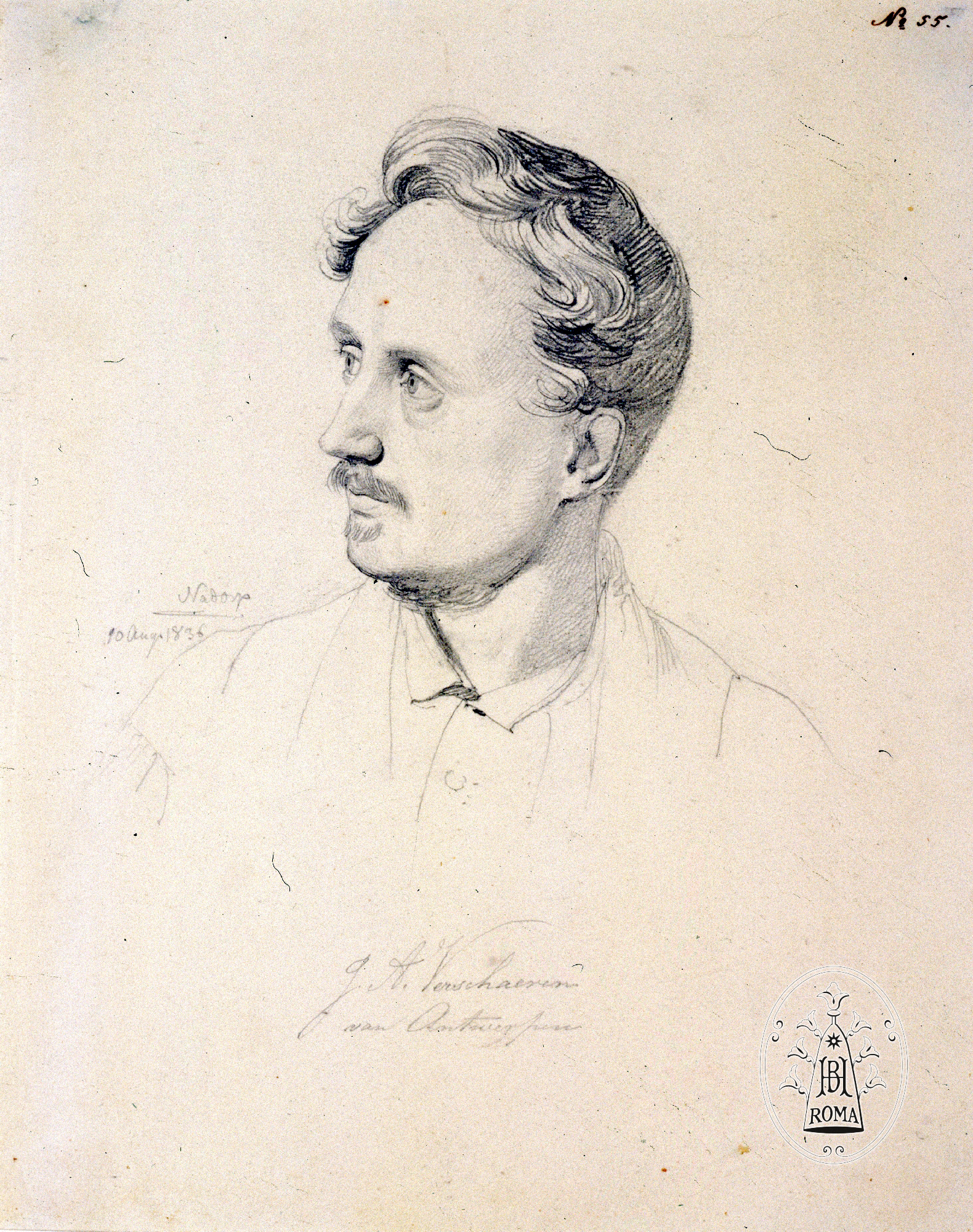 Porträt Jan Antoon Verschaeren, gezeichnet von Franz Johann Heinrich Nadorp, Rom 10. August 1836